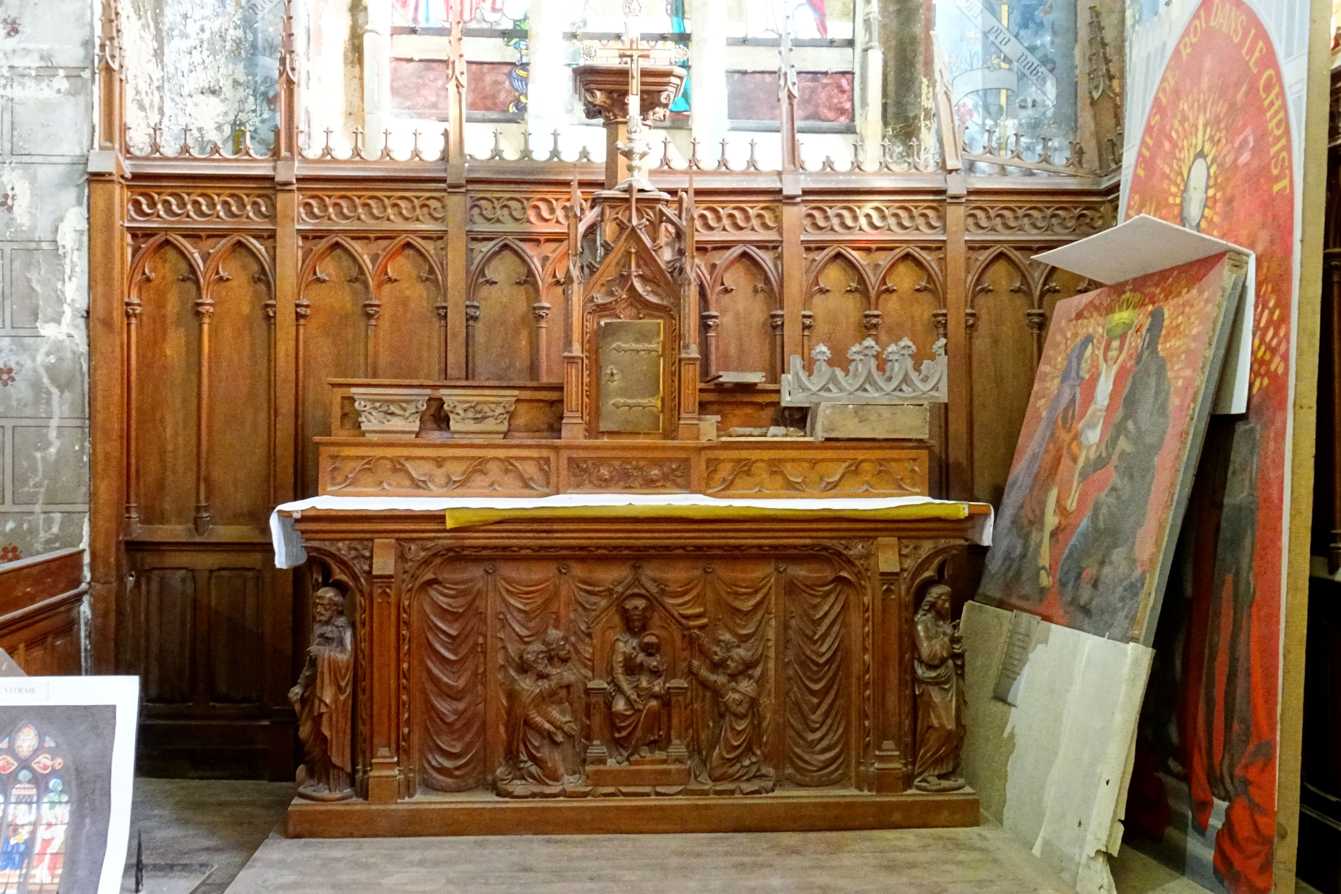 Chapelle latérale sud, 2e travée, autel de la Vierge, vers 1875-1882, sculpté par L. André et Moisseron, sculpteurs à Angers. Le bas-relief arbore Notre-Dame des Ardents entourée de quatre malades. Aux angles saint Joseph et saint Jean.